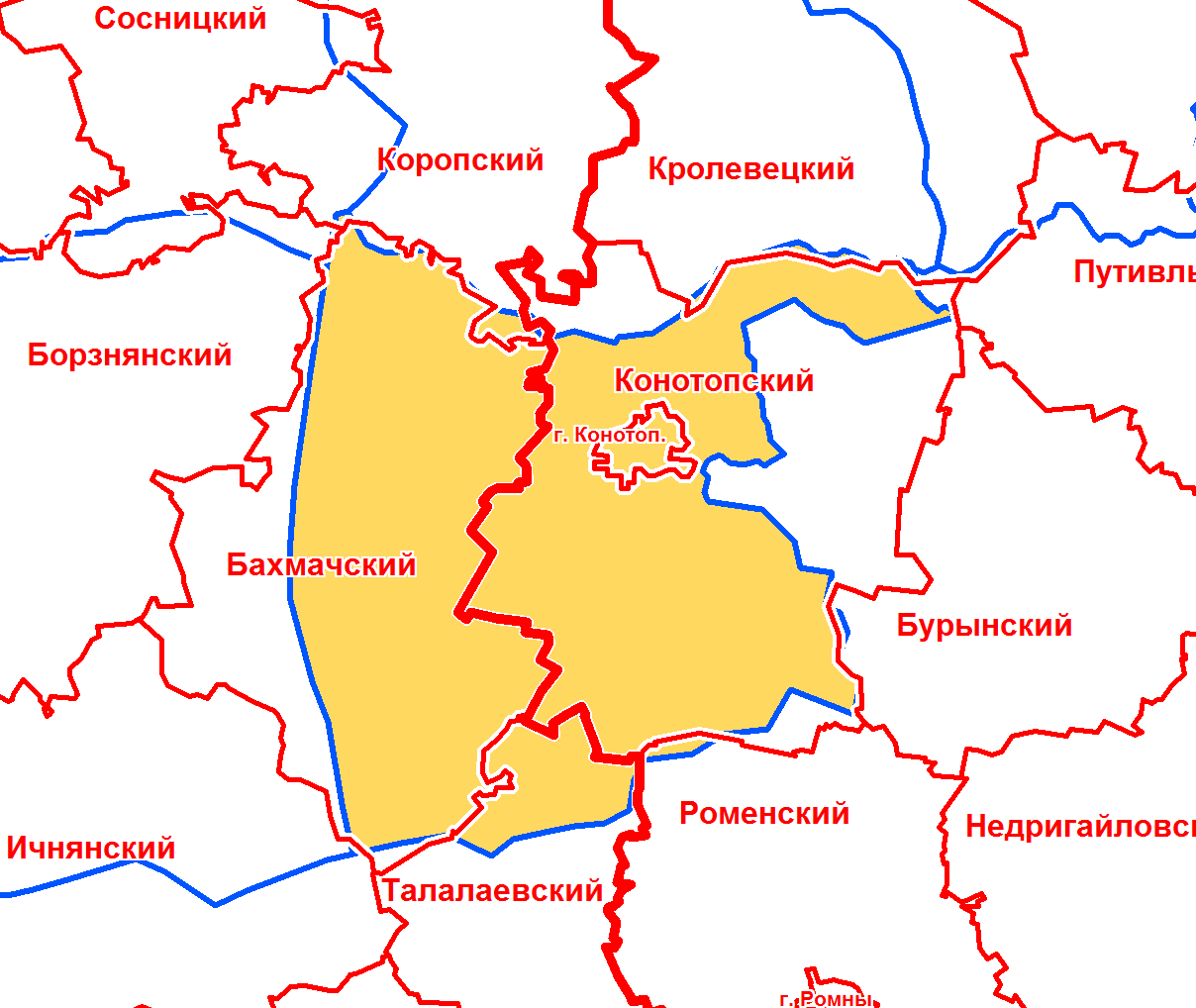 Конотопский уезд Черниговской губернии в современной сетке районов